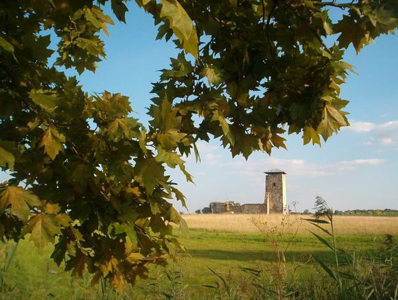 A soltszentimrei Csonka-torony. This is a photo of a monument in Hungary. Identifier: 2341